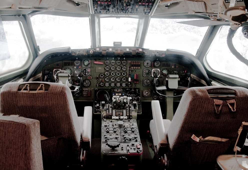 20100131-DSC_2294